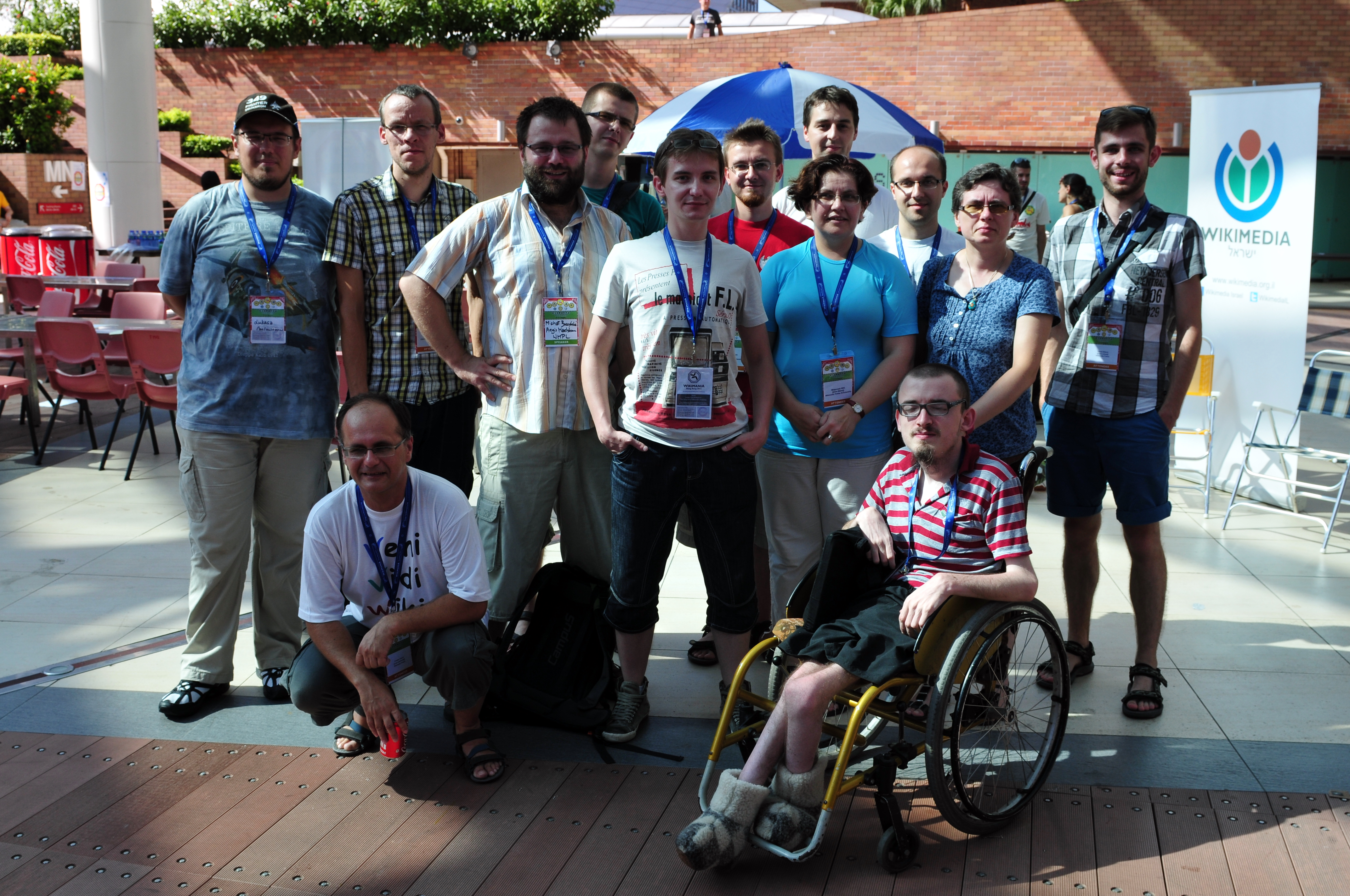 Wikimania 2013 Hongkong